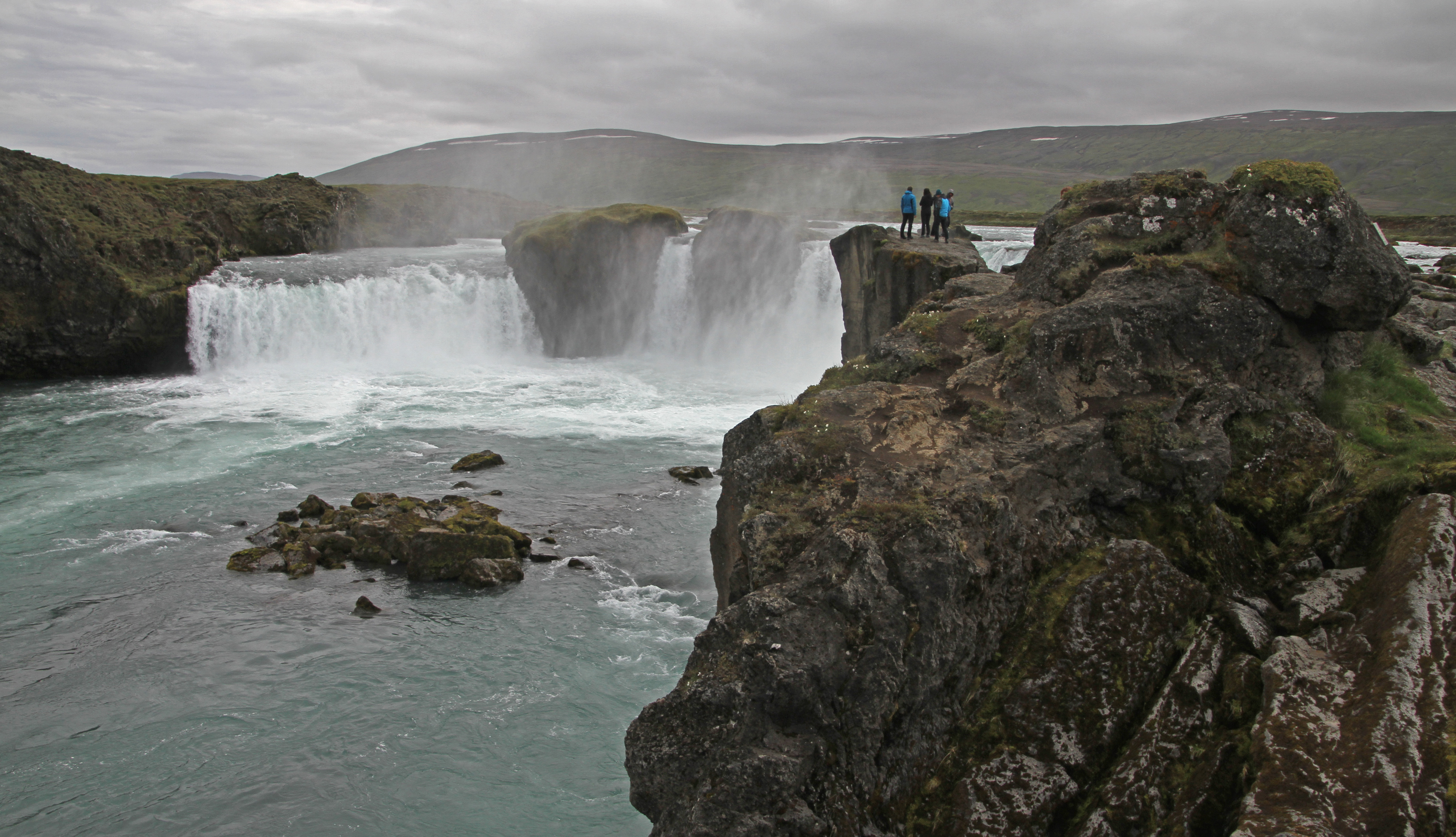 Goðafoss